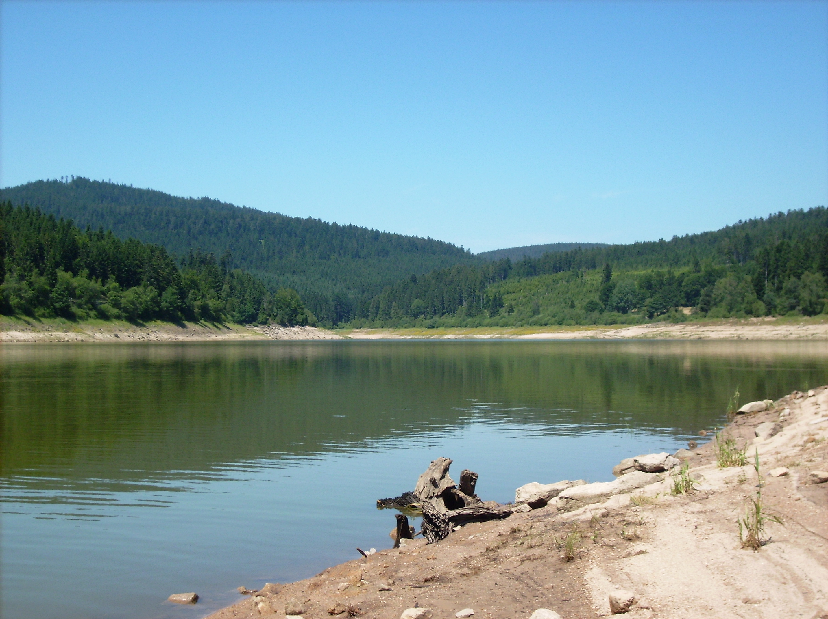 Schwarzenbachtalsperre zu Forbach/Baden